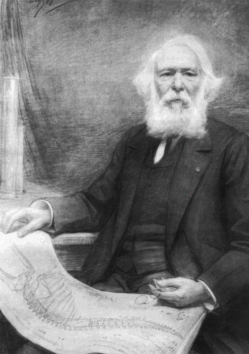 Pierre-Joseph Van Beneden (né le 19 décembre 1809 à Malines et mort le 8 janvier 1894 à Louvain) est un paléontologue et un zoologiste belge qui s'est spécialisé en parasitologie.